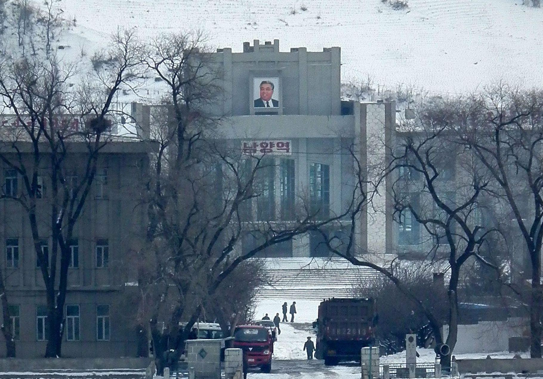 朝鮮南陽站조선말: 함경북도 남양역